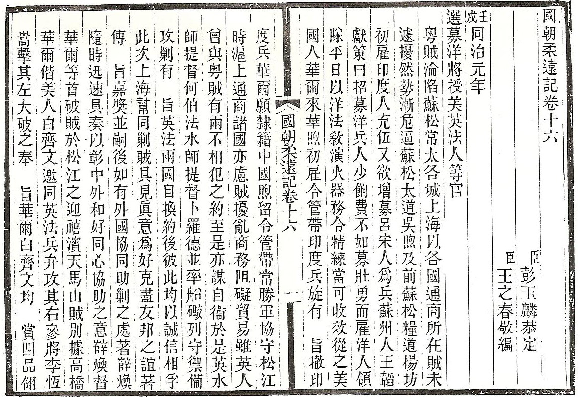 Qing Chao Rou Yuan Ji (Chinese:《清朝柔遠記》)